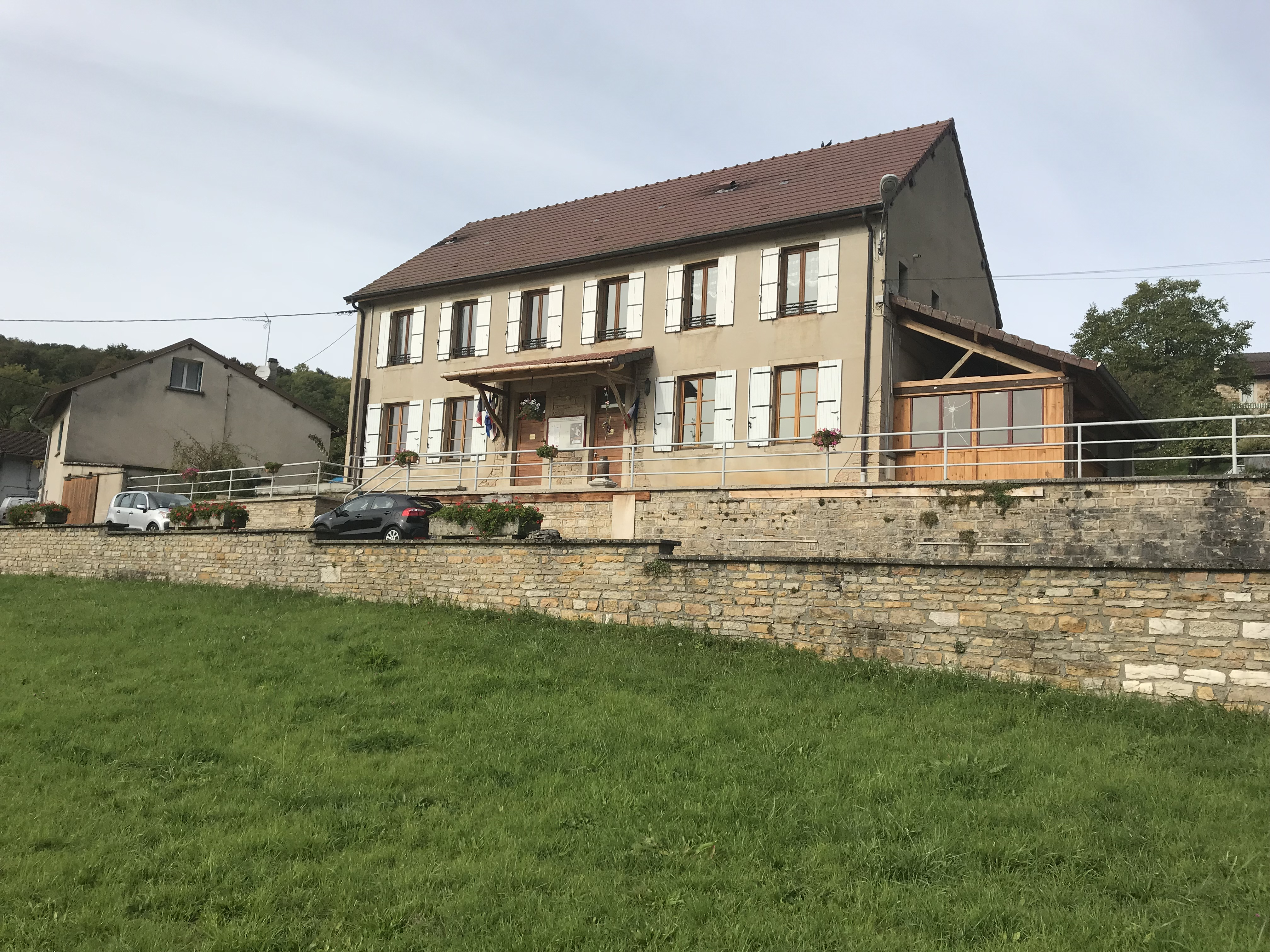 Image du village de Montagna-le-Reconduit, département du Jura, France, en octobre 2017.